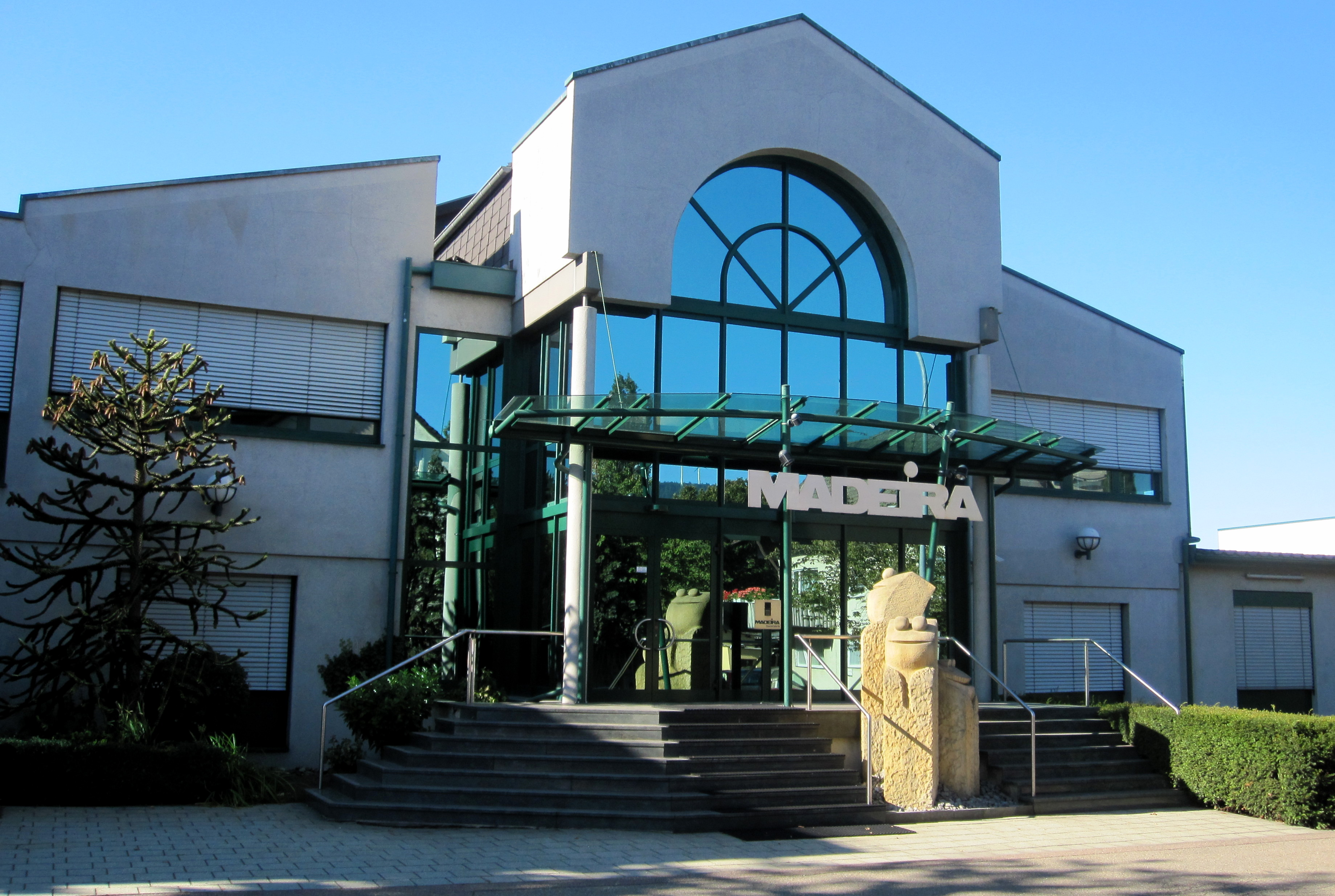 Madeira Garne Freiburg